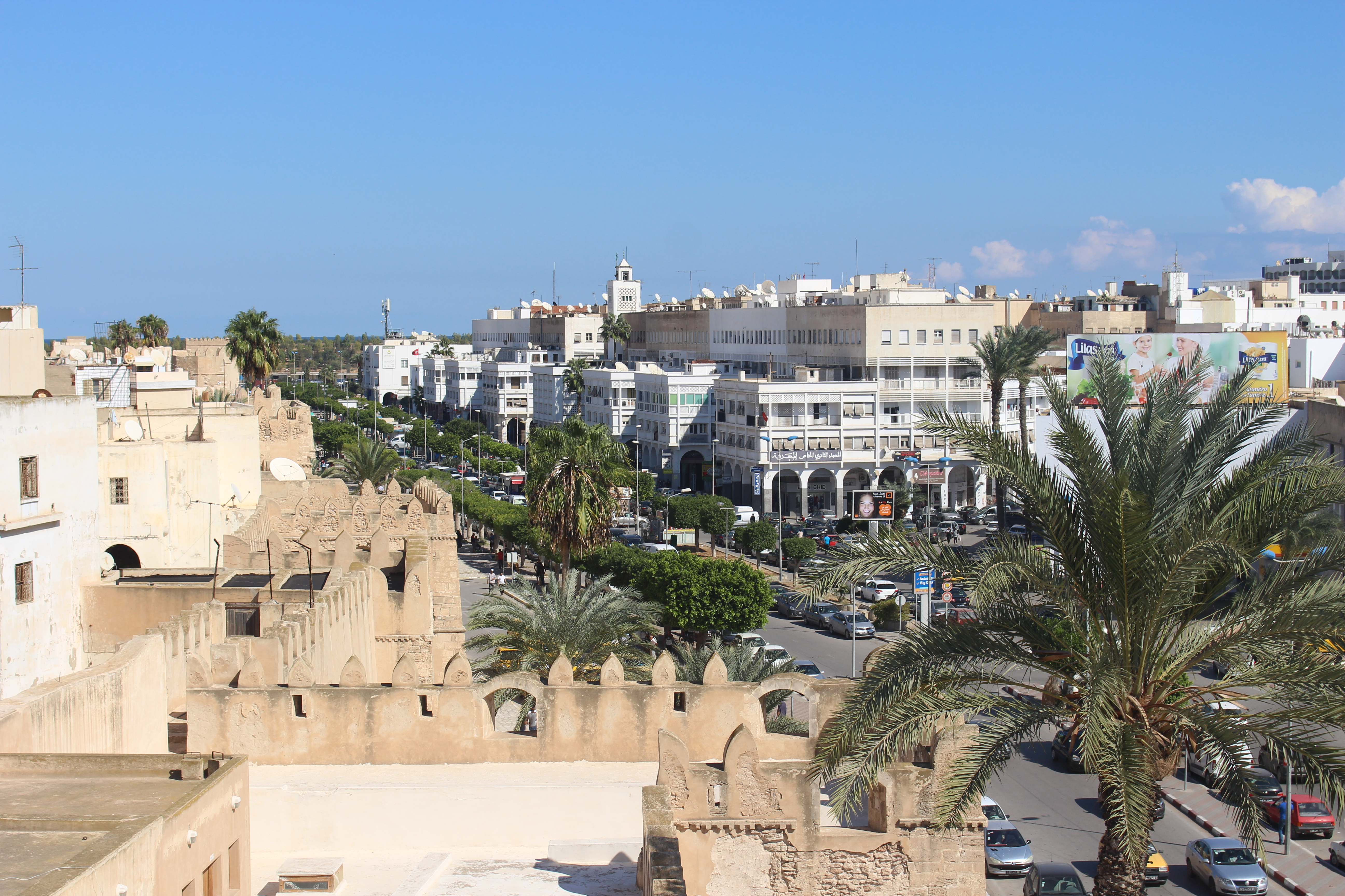 C'est une vue panoramique à partir d'une tour d'observation de la Casbah de Sfax. À partir de cette vue panoramique, on peut voir la muraille de Sfax, l'Avenue Ali Balhaouane et les bâtiments en regard avec l'Avenue Ali Balhaouane.